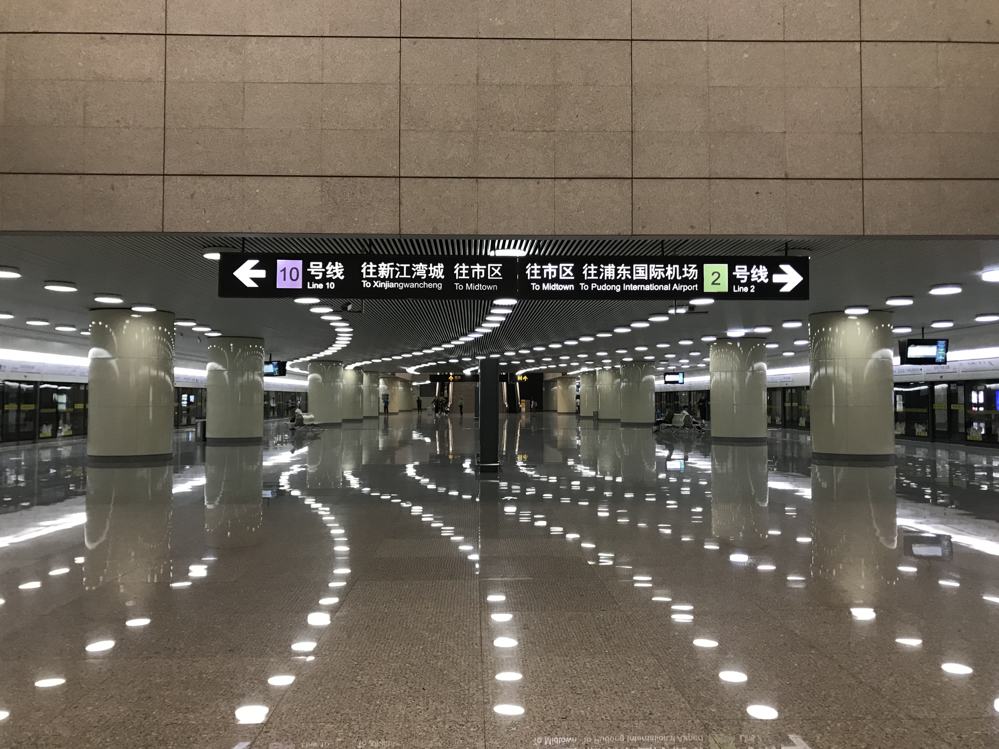 虹橋第2ターミナル駅のホーム(左側は10号線、右側は2号線)